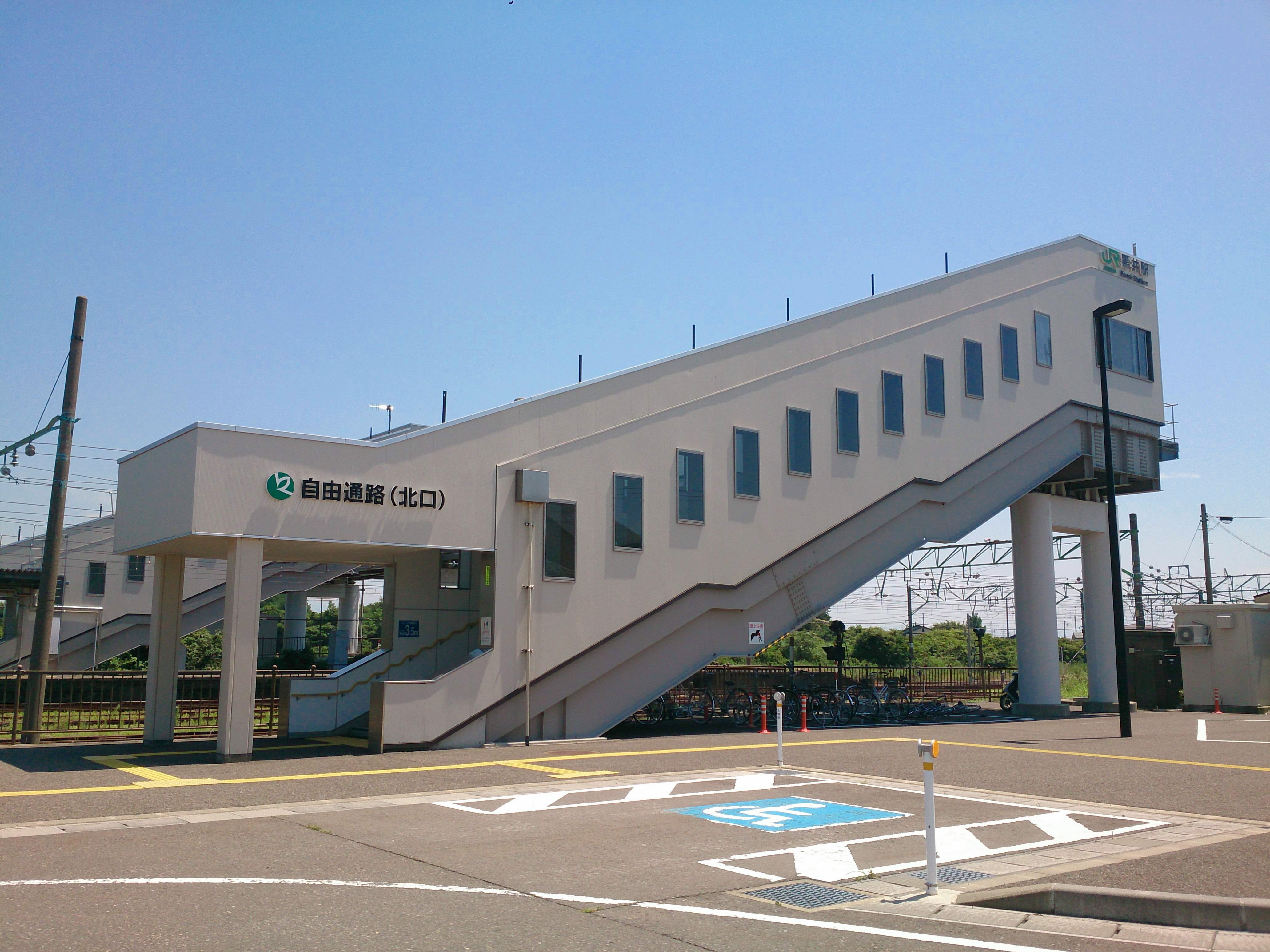 黒井駅・北口